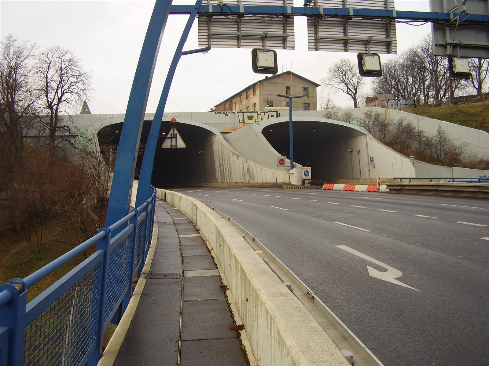 Vjezd do strahovského tunela v Praze na Smíchově